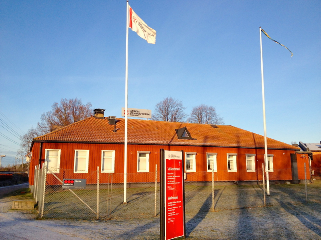 Sveriges järnvägsmuseum i Gävle